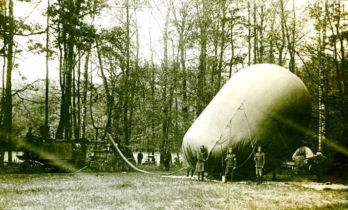 Снимка от производство на газ за австро-унгарски военни балони.